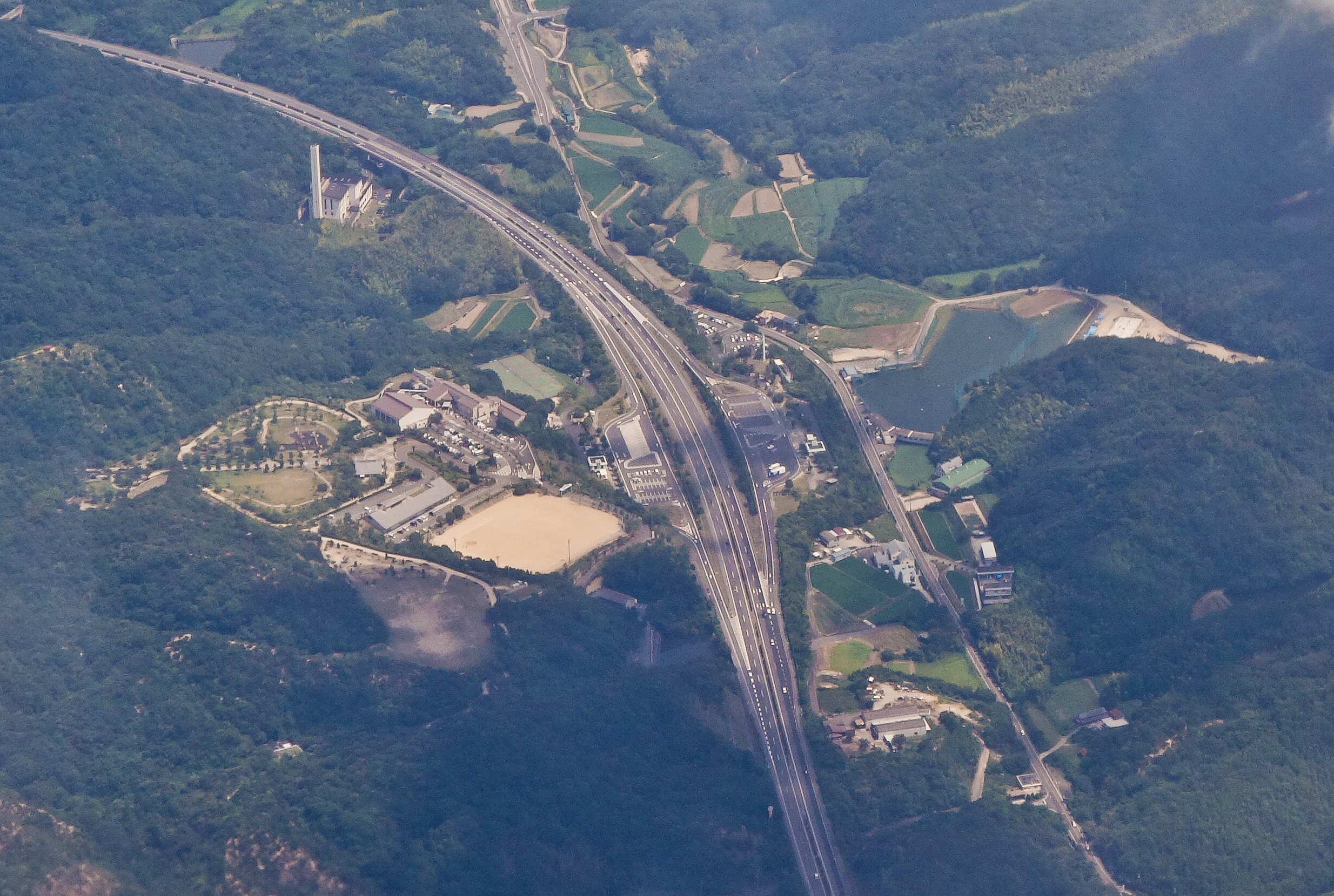 緑パーキングエリア （神戸淡路鳴門自動車道、南あわじ市） （上空から、2013年7月21日撮影）